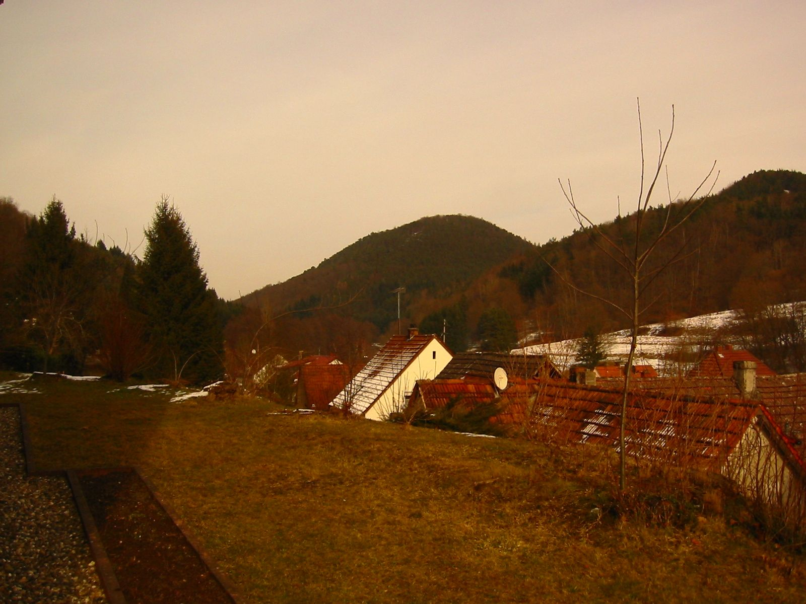 Niederschlettenbach